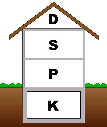 Sockwerke, Illustration von verschiedenen Stockwerken eines Hauses (c)2003 by Tobias Erbsland Erstellt mit Draw, nachbearbeitet mit GIMP.